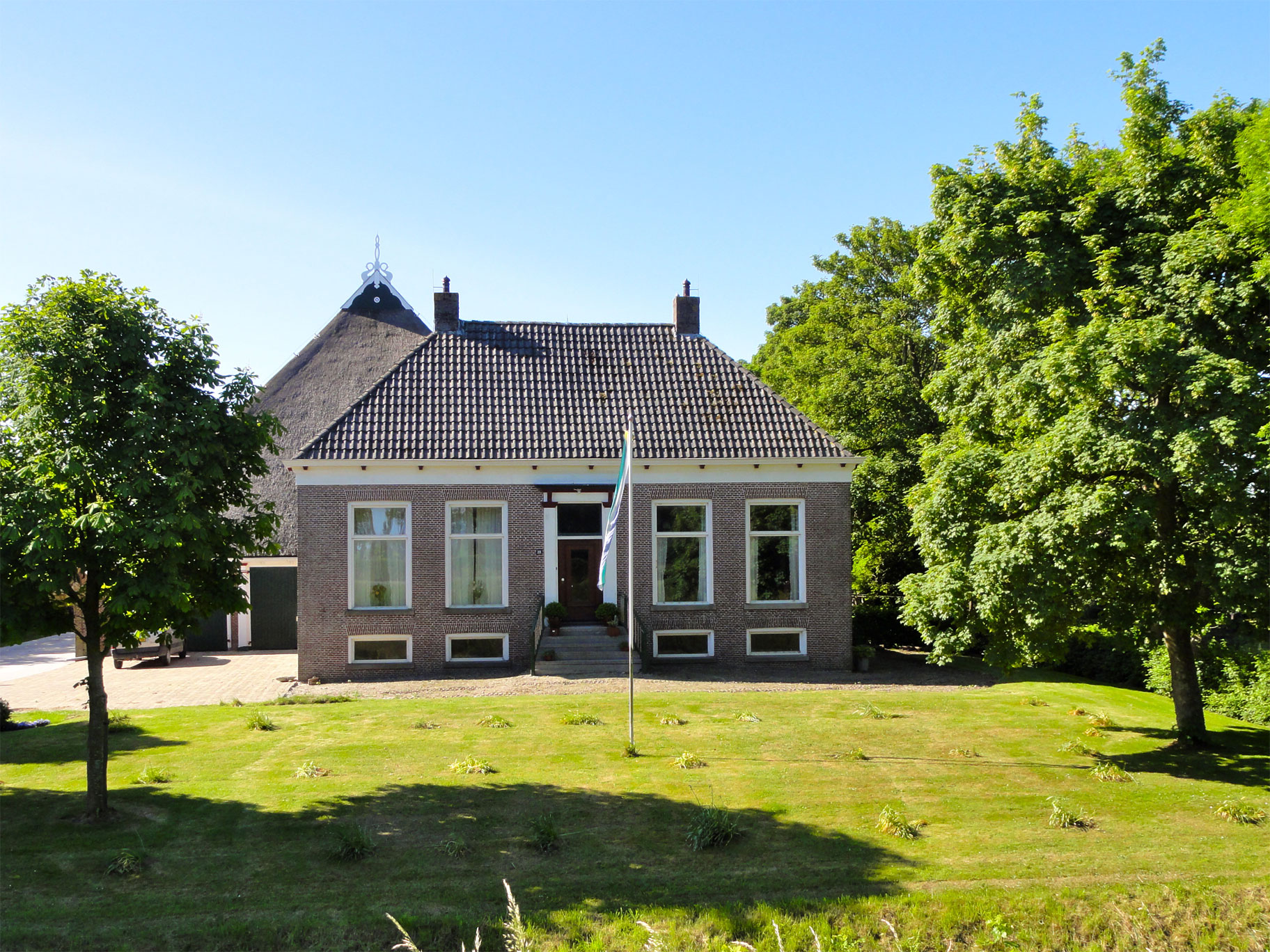 Oudebildtdijk 201 in Sint-Annaparochie